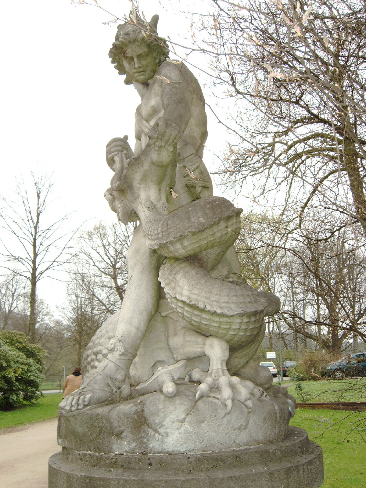 Siegfried sculptor Constantin Dausch made in Rome for Bremen 1890